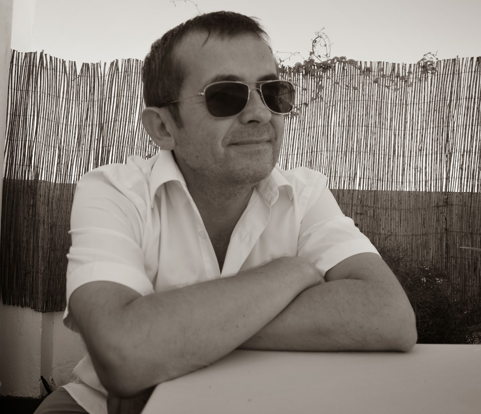 Antonio Serrano Cueto